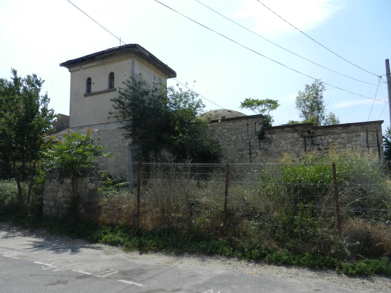 Fosta baie turcească construita la ordinul sultanului Abdul Medgid